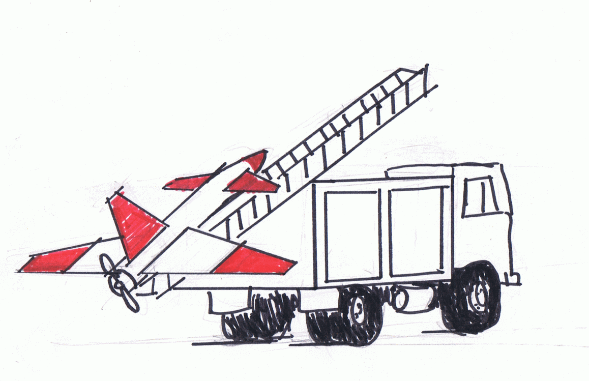 Ababil UAV